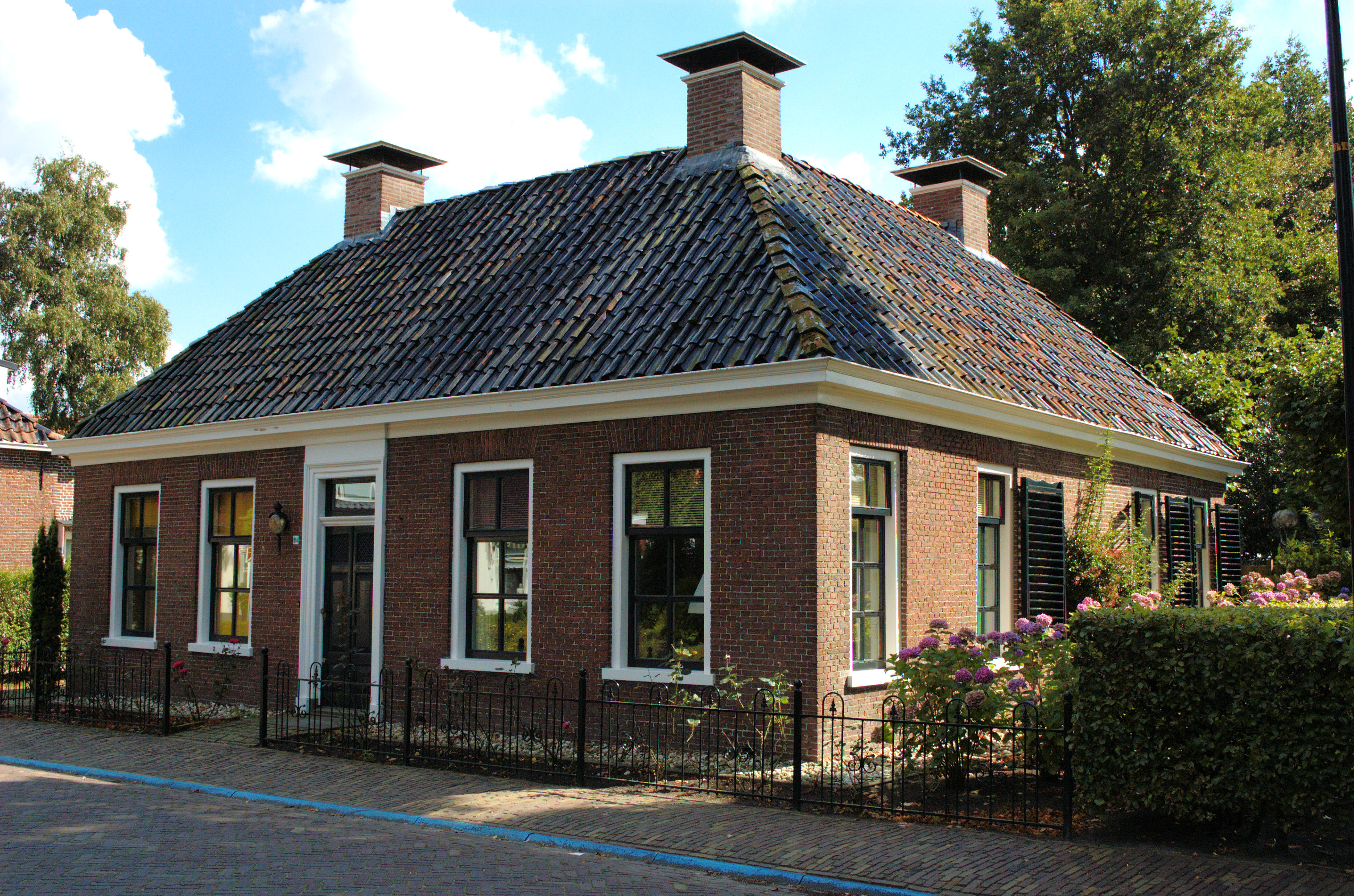 woonhuis Schoolstraat 84, Burgum